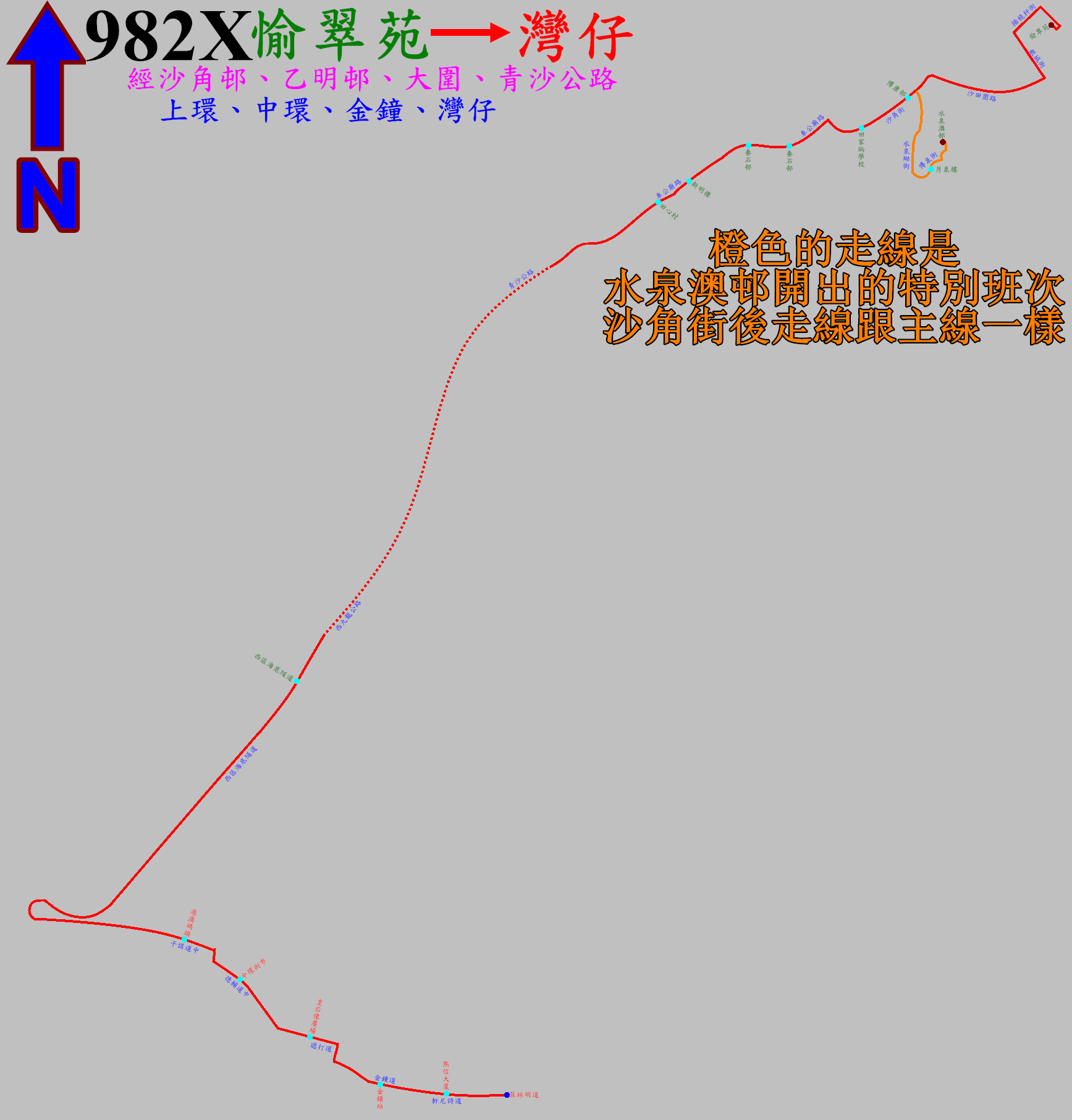 中文（香港）: 過海隧巴982X線的走線圖